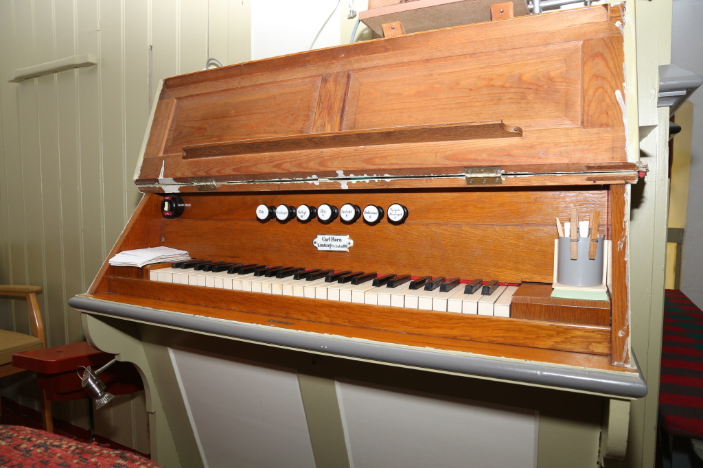 Horn-Orgel in Sauerthal (1903) - Ansicht des links an das Orgelgehäuse angebauten Spieltischs (Veröffentlichungsgenehmigung am 15.5.2014 durch V. Rohrbach/Lorch erteilt)